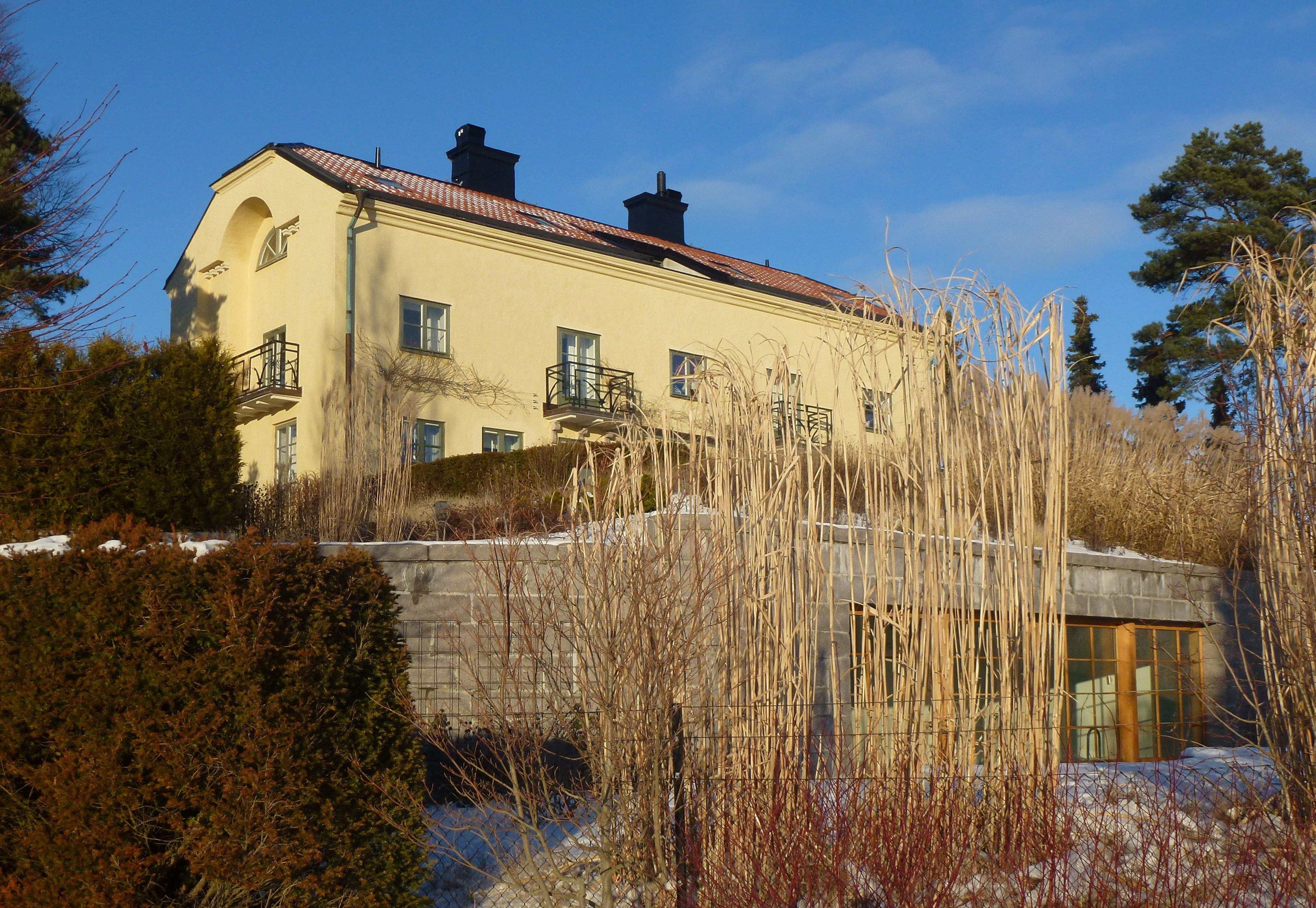 Grimbergs Villa, Fyrstigen 1 / Strandvägen 36, Djursholm, arkitekt Carl-Otto Hallström